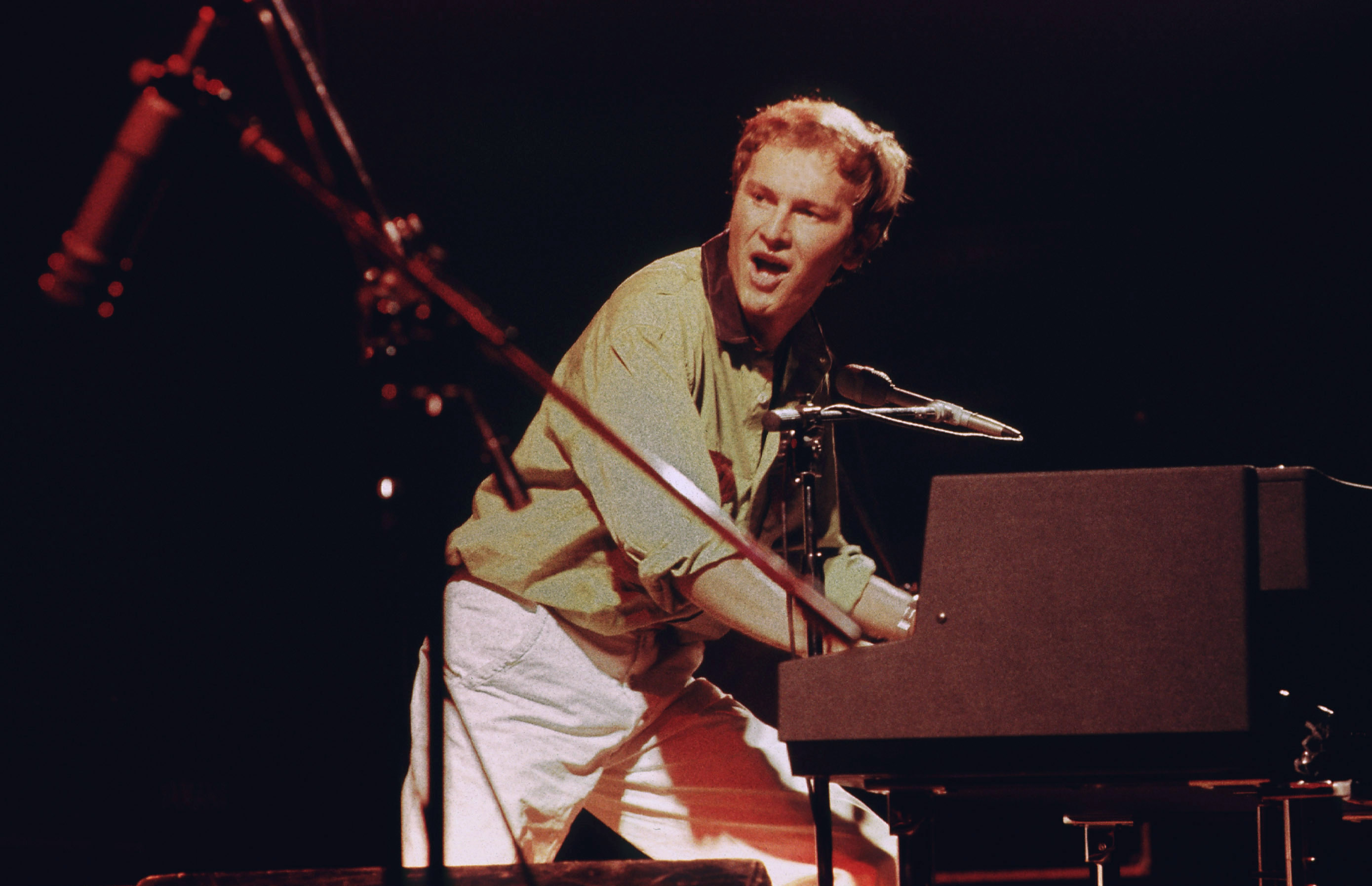 Il cantante Ron, alias Rosalino Cellamare, in un concerto dei primi anni 90 del XX secolo.